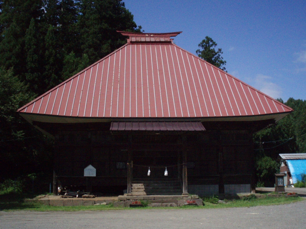 里社講堂